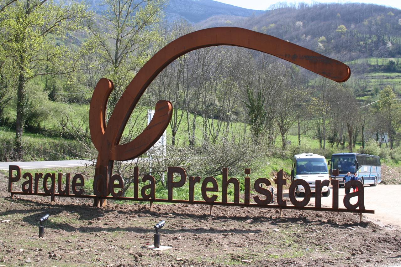 Entrada al parque de la historia de Teverga